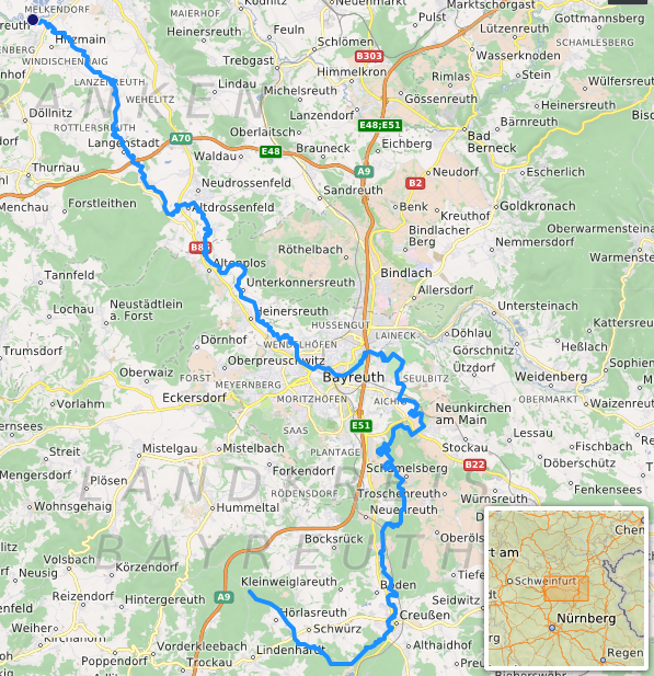 carte réalisée sur umap This map may be incomplete, and may contain errors. Don't rely solely on it for navigation.